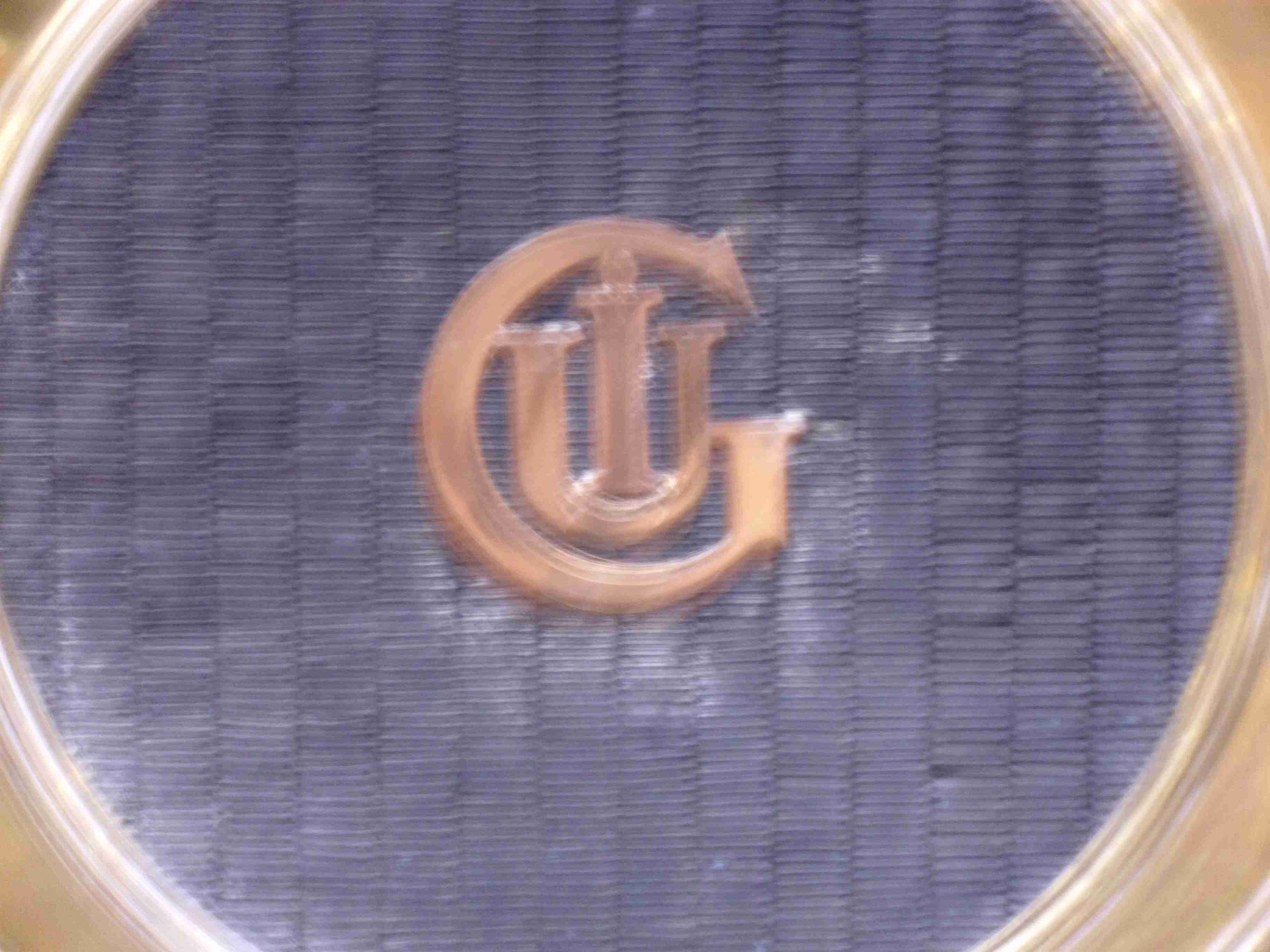 Emblem Le Gui